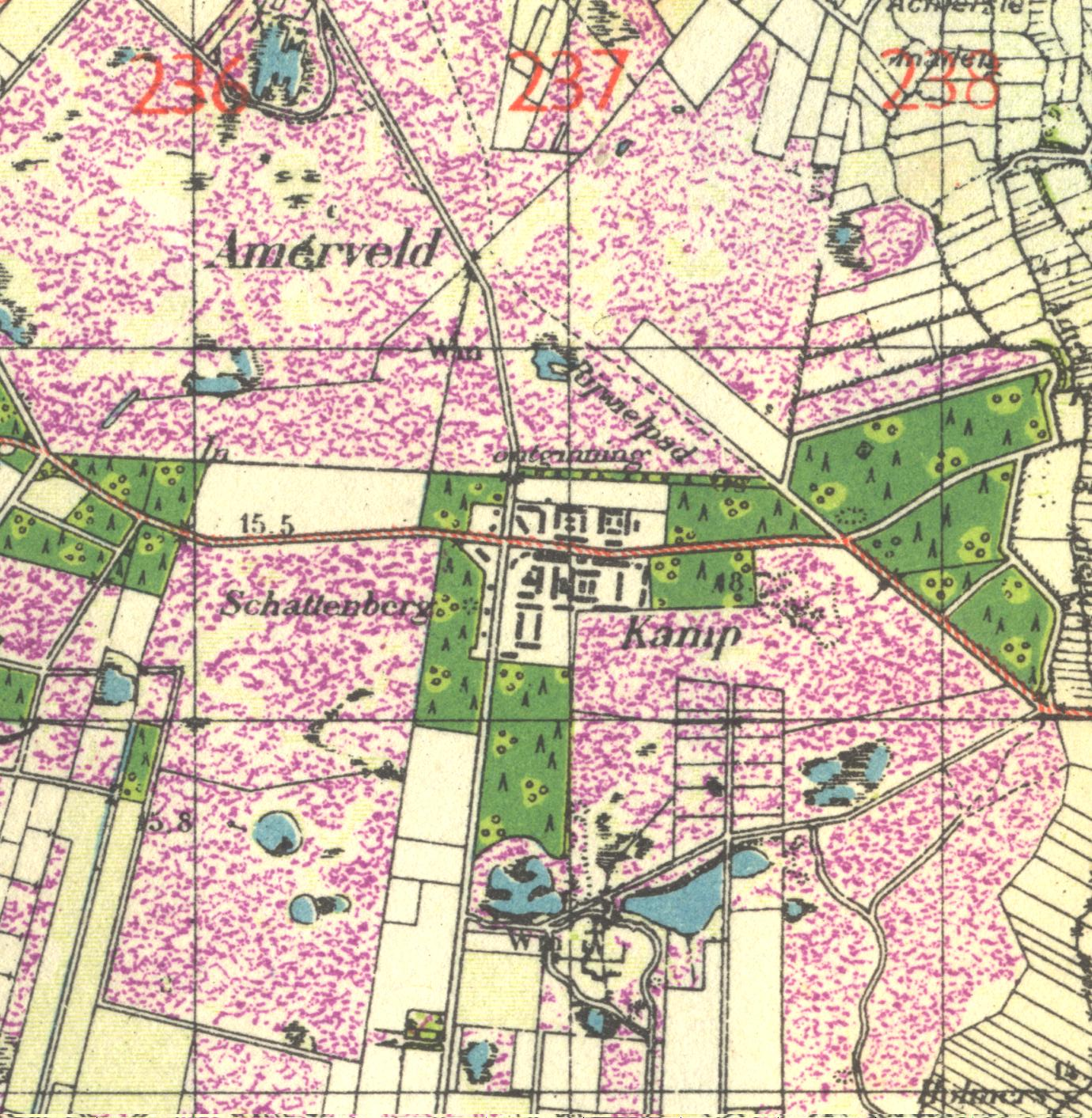 Truppenkarte West Beilen